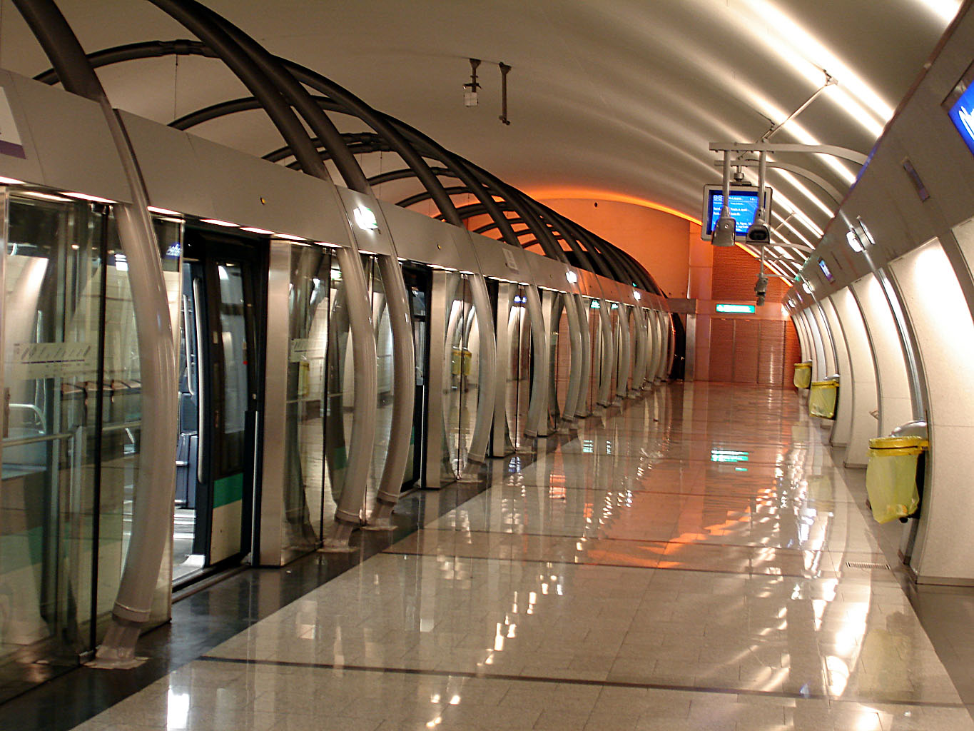 La station Olympiades de la ligne 14 du métro de Paris, France